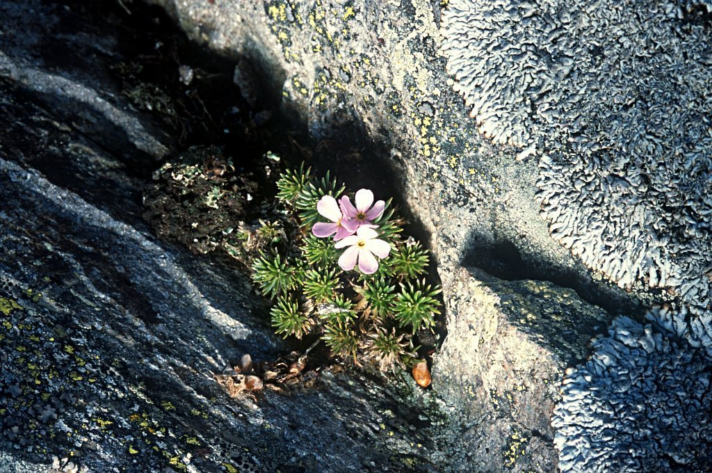 Androsace carnea, photo de utilisateur:cptcv, 10 mai 2003, Bious Artigues (64), France